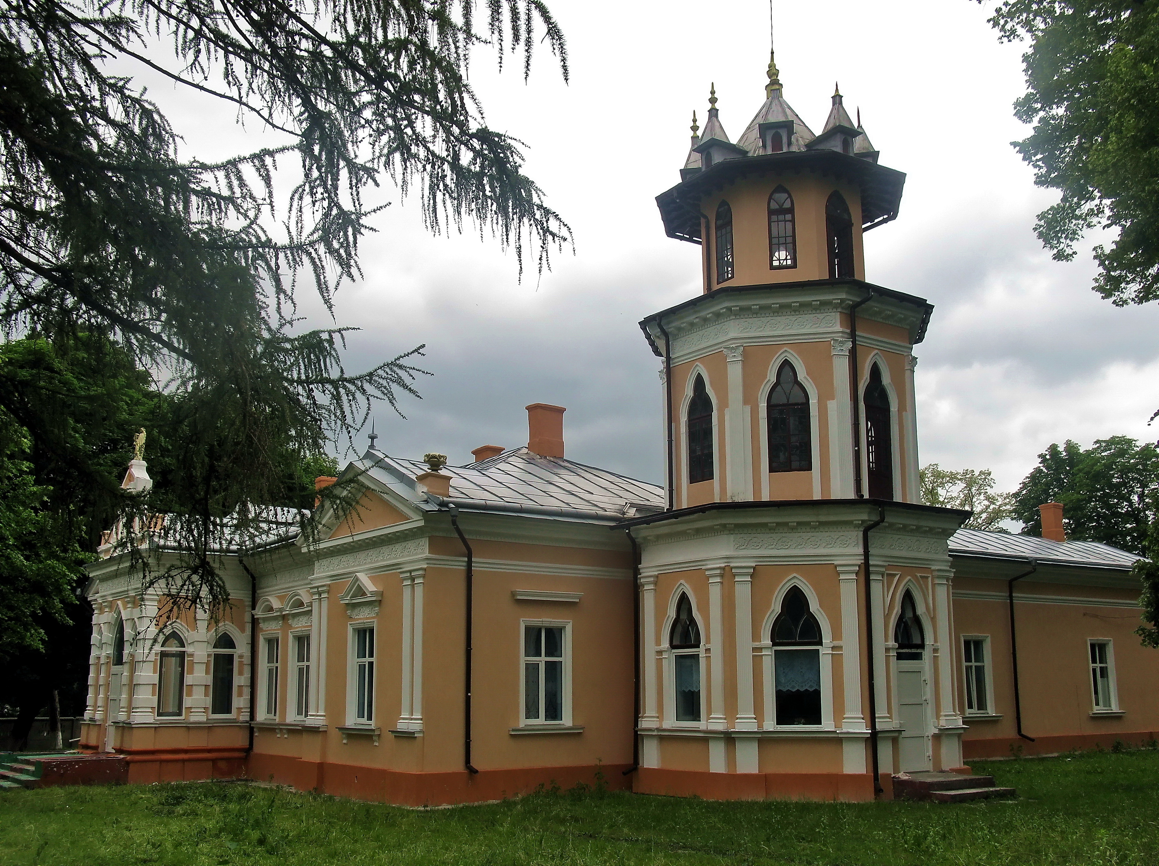 Палац Манеску (мур.), с. Чортория